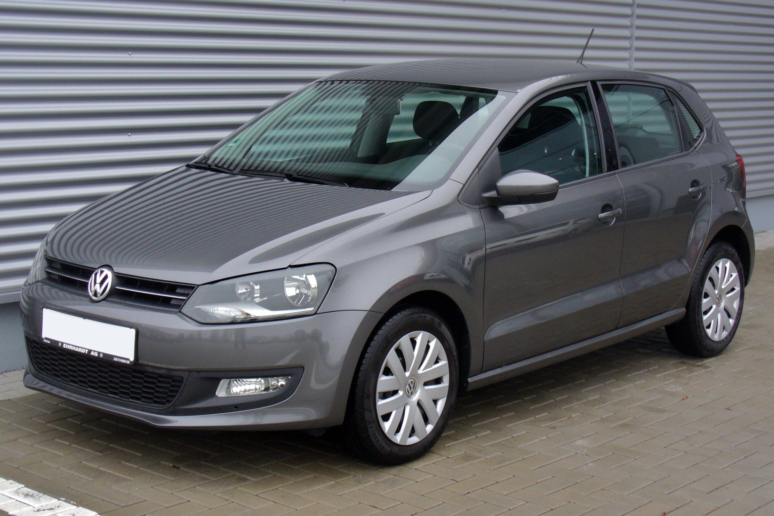 VW Polo V